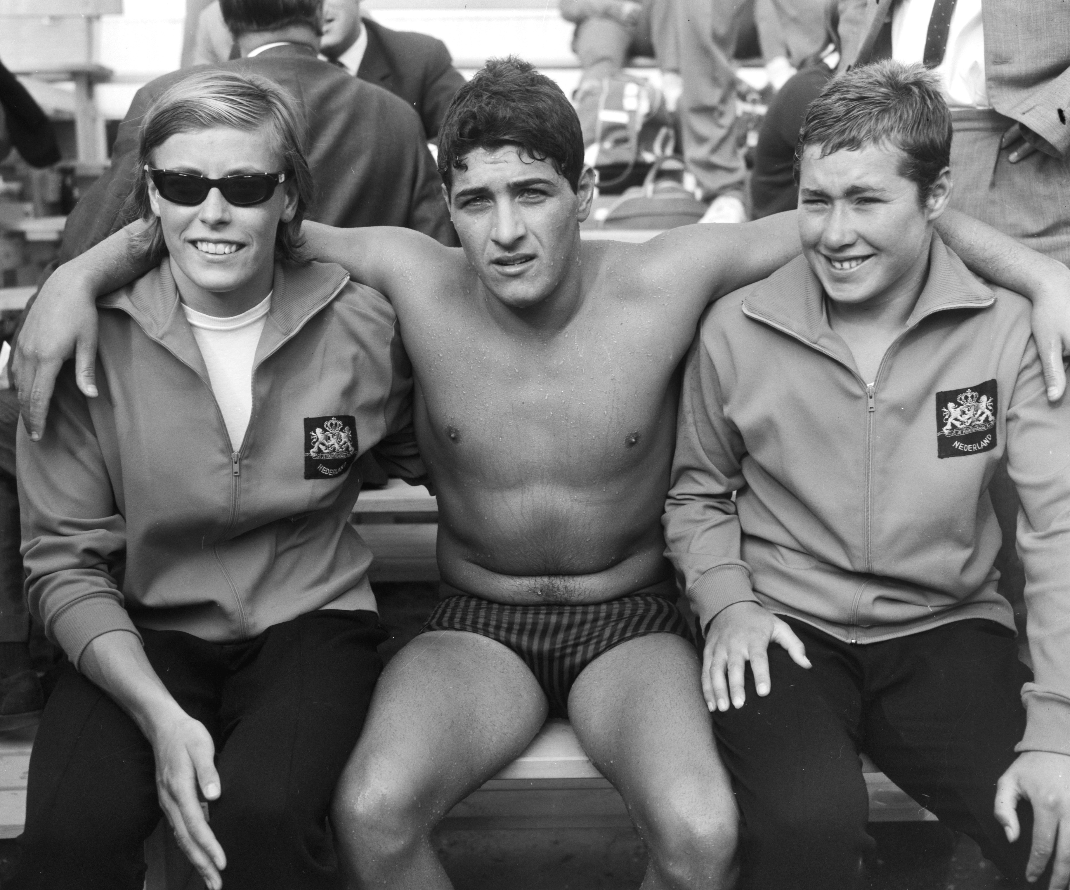 Zweminterland Nederland tegen Italie in Dieren, G. Kok , Giovanni Orlando , Adrie Lasterie